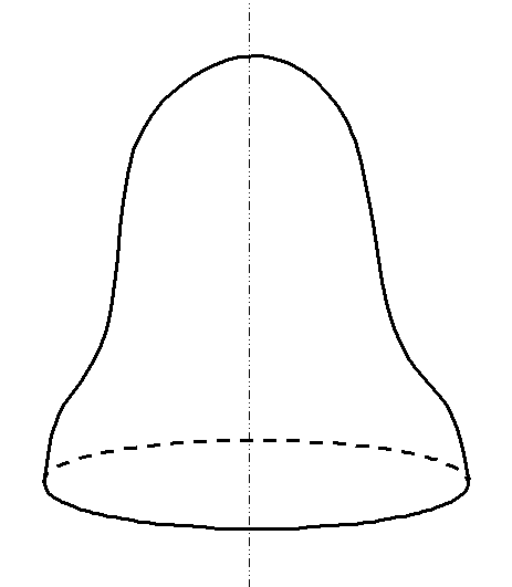 Glockenform schematisch - grosses Bild - selbstgepixelt. Benutzer:MTob